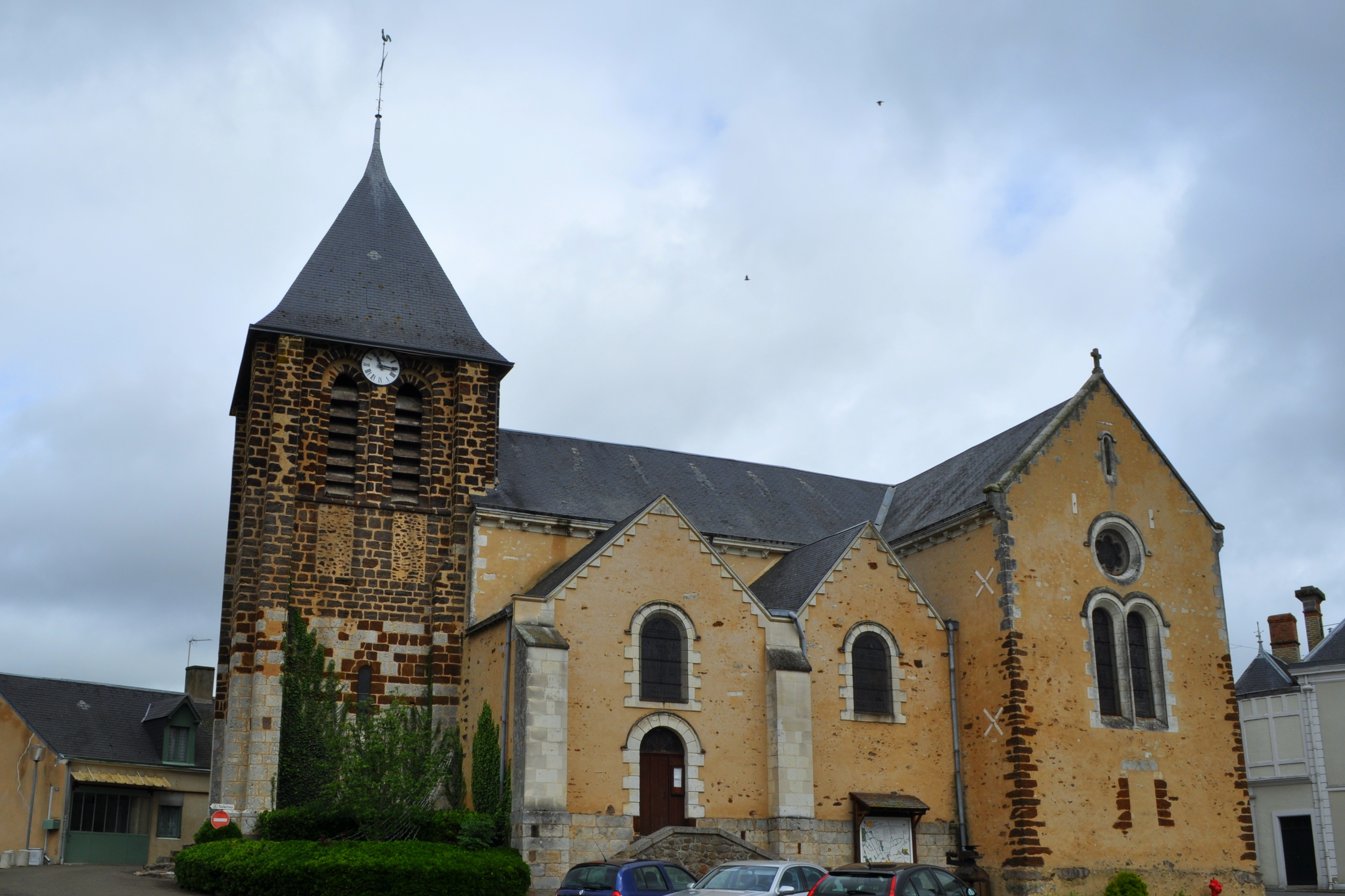 Eglise Saint-Martin d'Yvré-le-Pôlin (Sarthe)